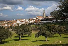 Paisaje rural